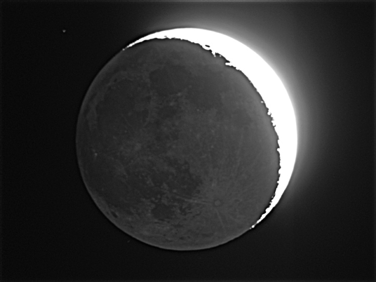 Автор: Сомов Александр. 07.01.2011г. Телескоп ТАЛ-100RS, окуляр НПЗ-25мм, монтировка МТ-3S, Фотоаппарат Canon Power Shot A580, окулярная съёмка - 40крат, одиночный кадр, выдержка 4 сек., iso-100.